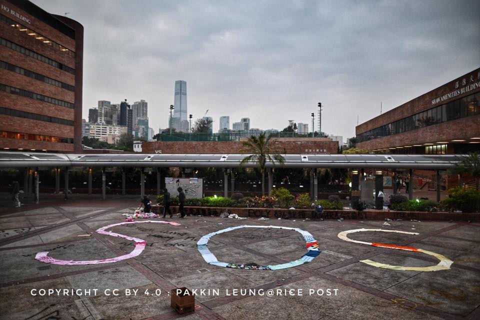 理大有學生用毛巾做出SOS字眼